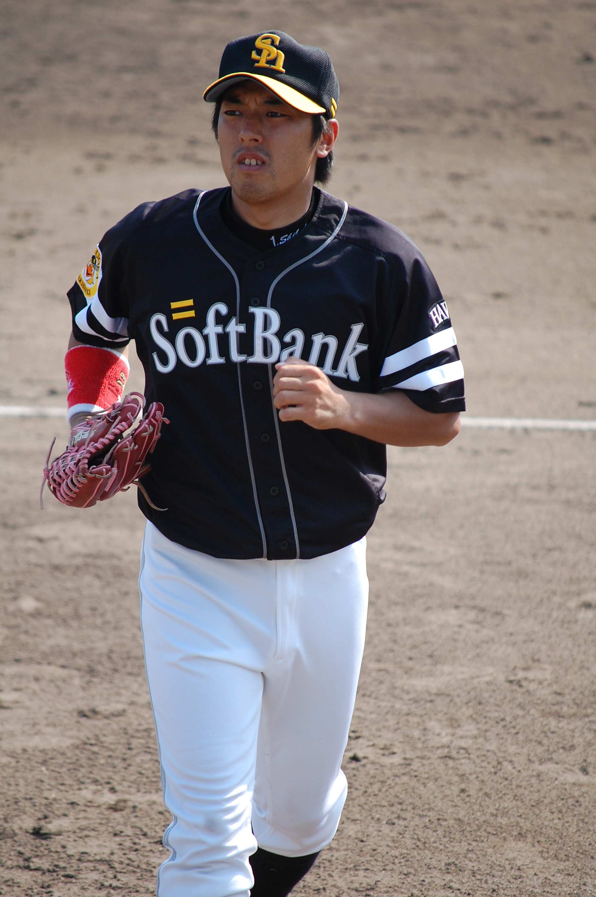 柴原洋。2009年9月5日、ウエスタン・リーグ公式戦 ナゴヤ球場 中日対ソフトバンク戦にて撮影。